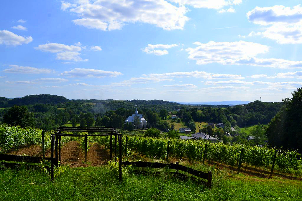 Winnica nad Doliną w Bączalu Dolnym niedaleko Jasła